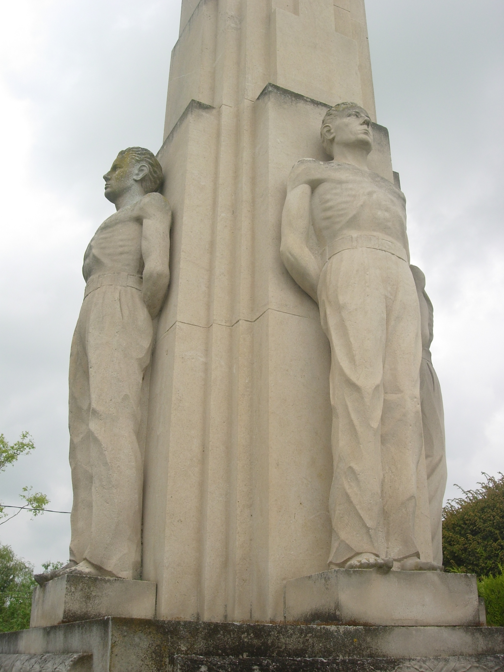 Monument aux morts de Laines aux Bois